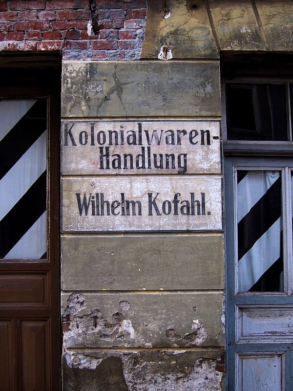 Historische Reklame in der noch nicht sanierten Altstadt von Wismar